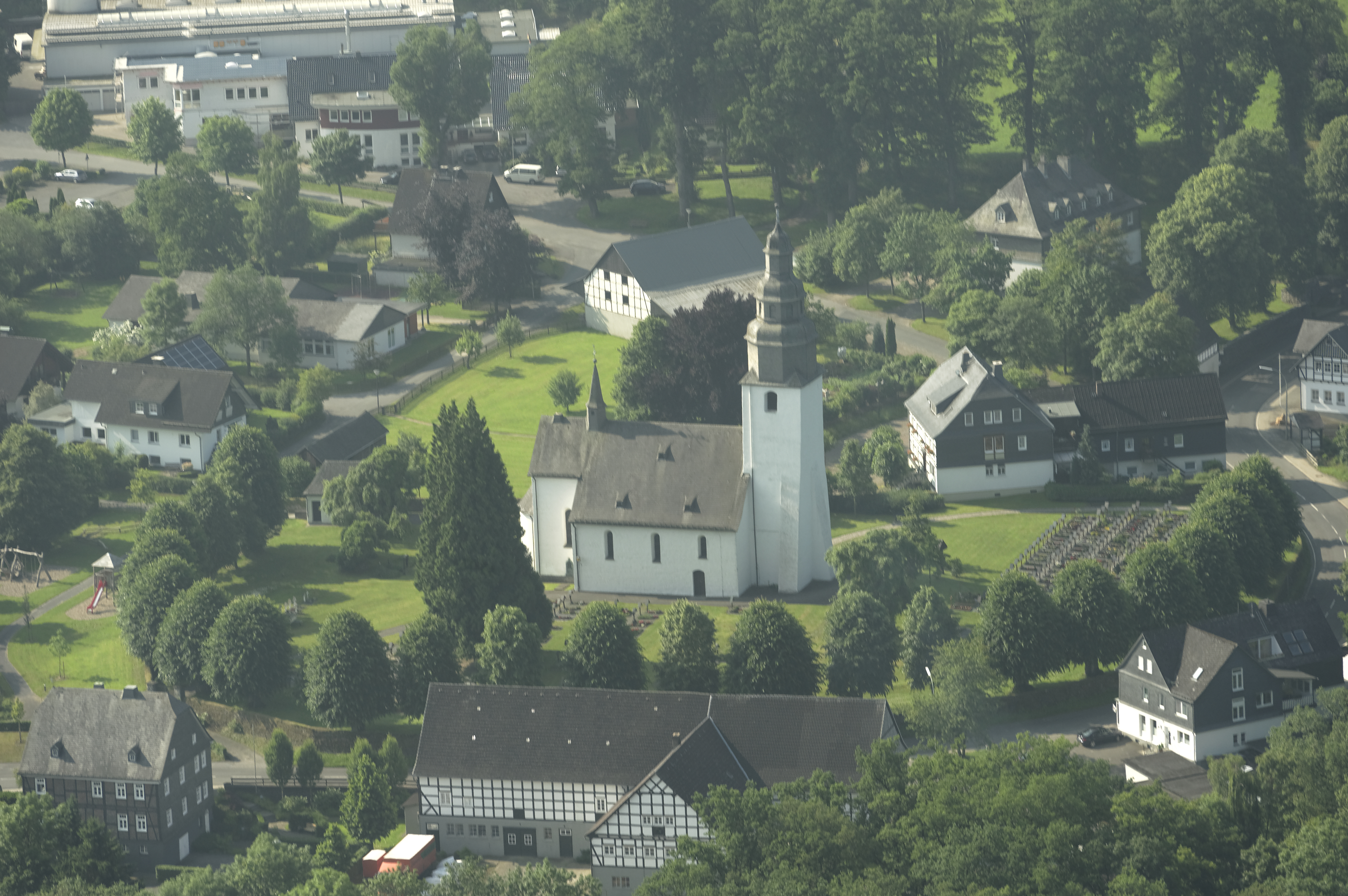 Fotoflug Sauerland-Ost, katholische Pfarrkirche St. Peter und Paul in Schmallenberg-Wormach